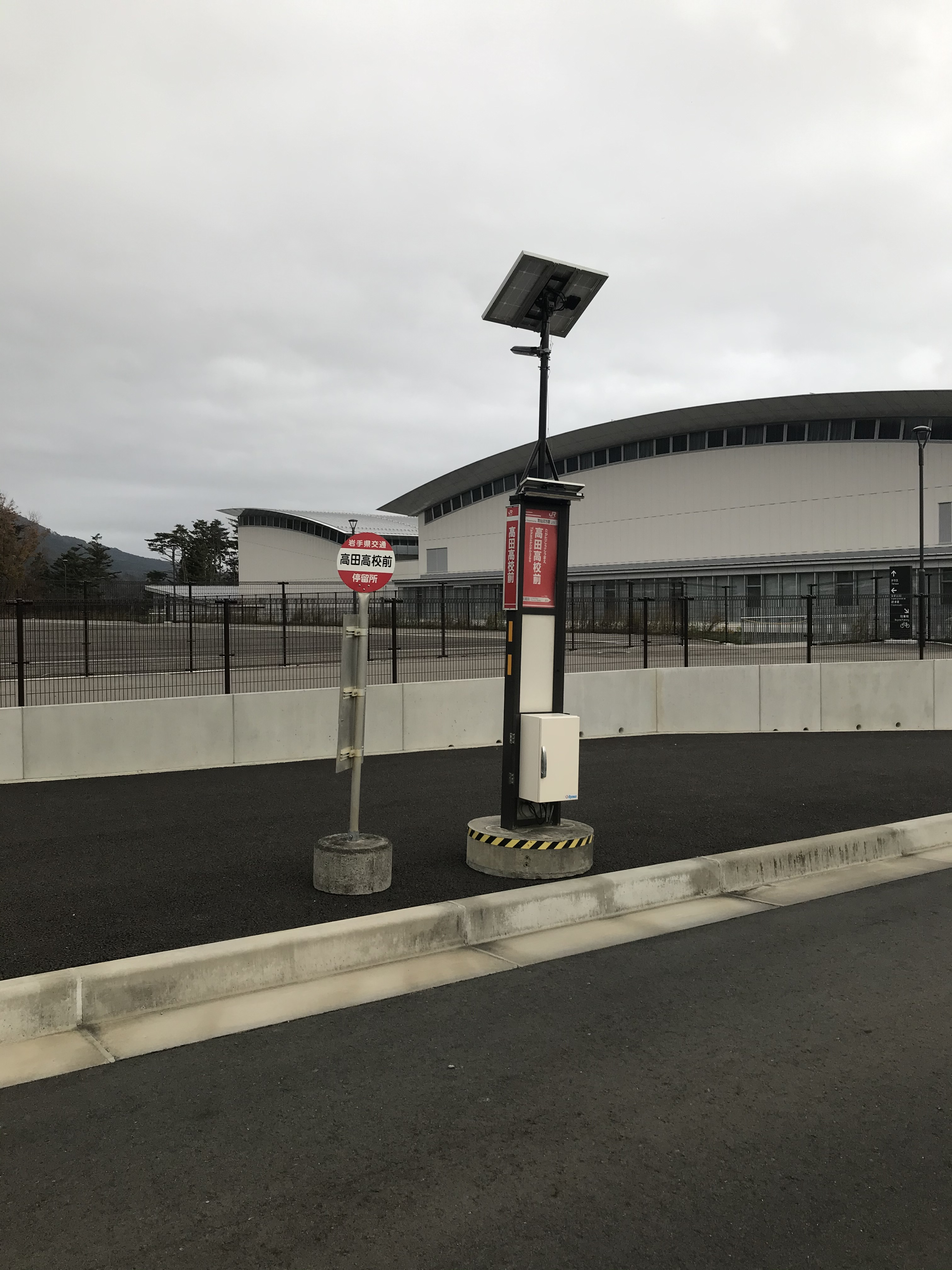 BRT大船渡線の高田高校前駅（上り）